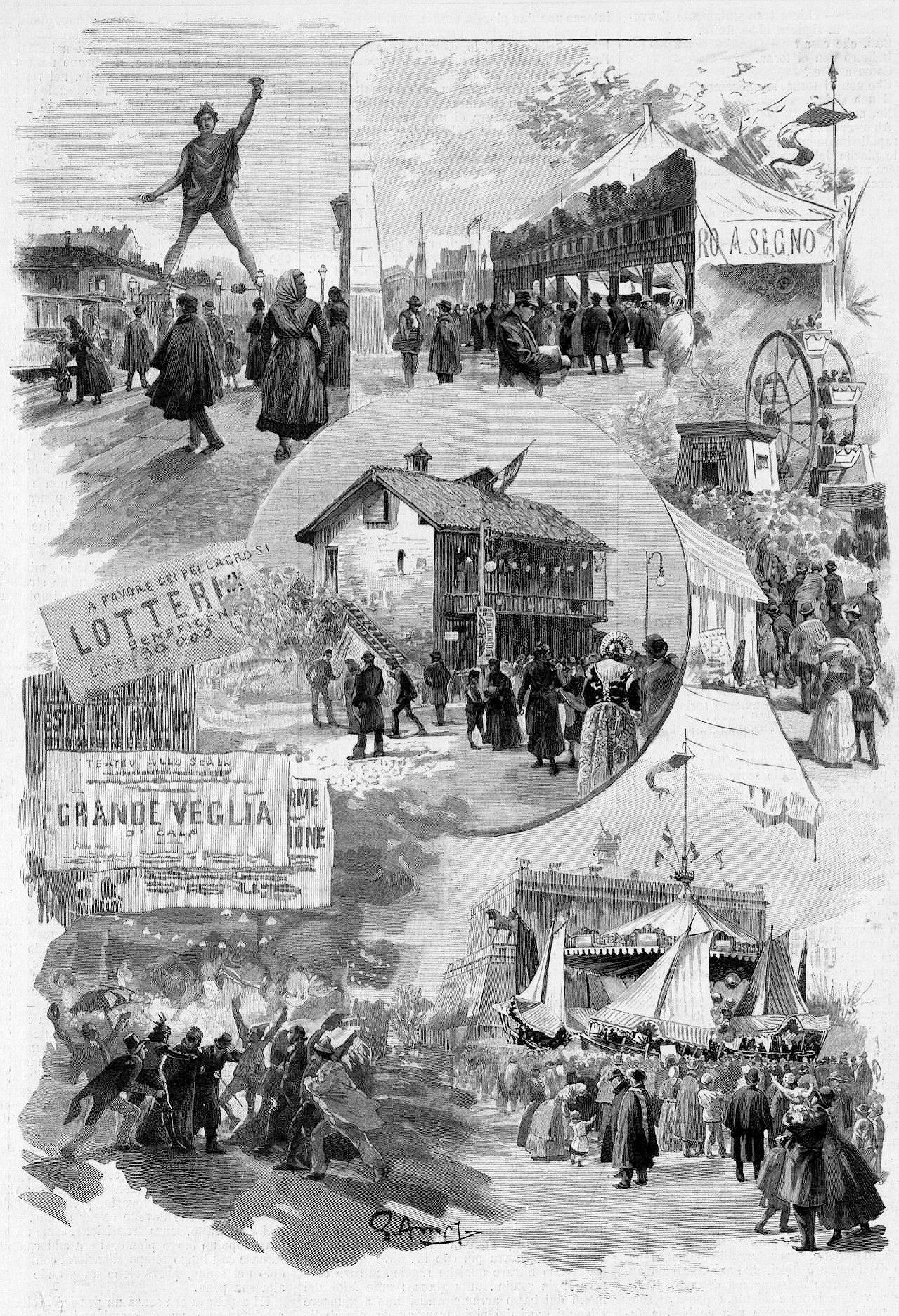 Fiera di Porta Genova per il carnevale del 1890; al centro la casa di Meneghino